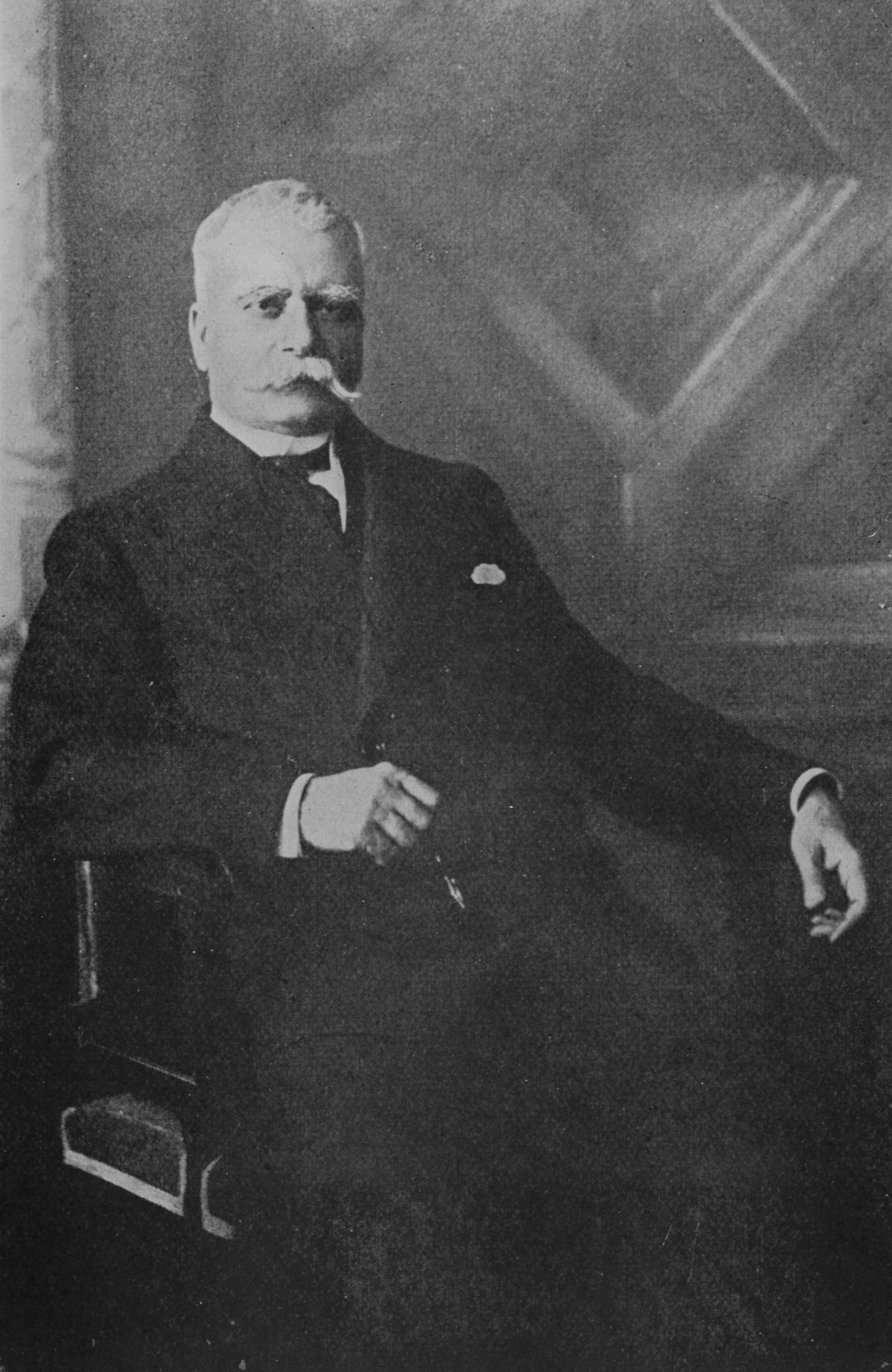 Alexandros Zaimis, político griego.